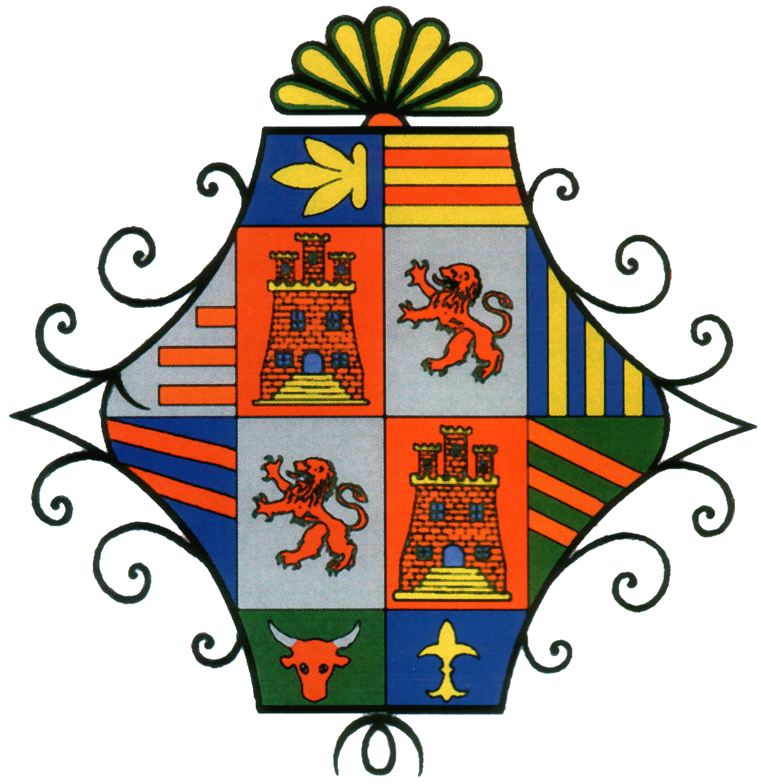 Escudo de Cabeza la Vaca